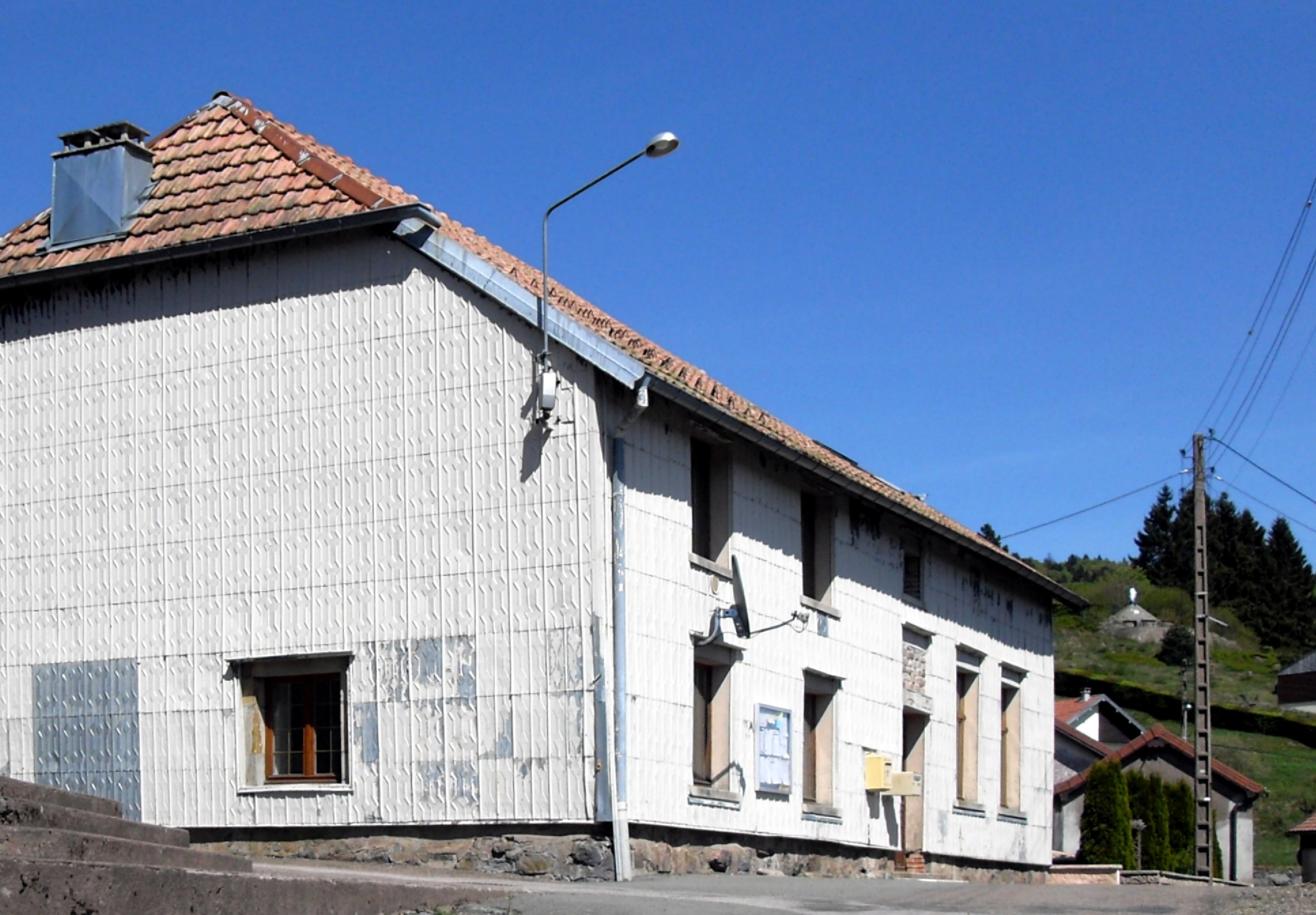 La mairie de Belfahy